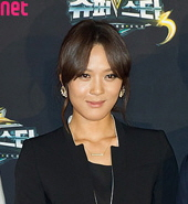 CJ E&M 엠넷 슈퍼스타K 3 기자간담회